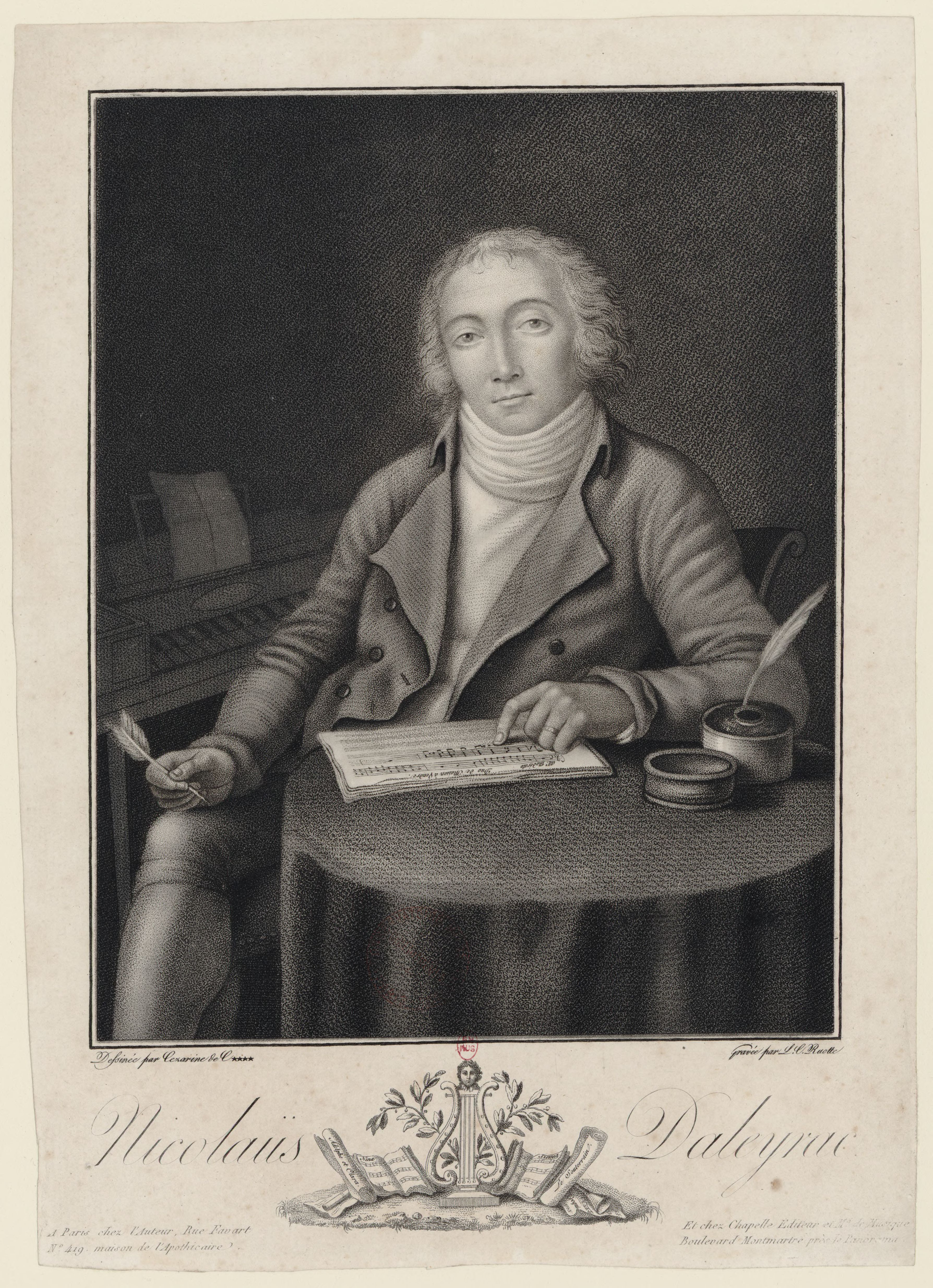 Nicolas Dalayrac assis compose un « Duo de Maison à Vendre » selon un tempo « allo moderato »